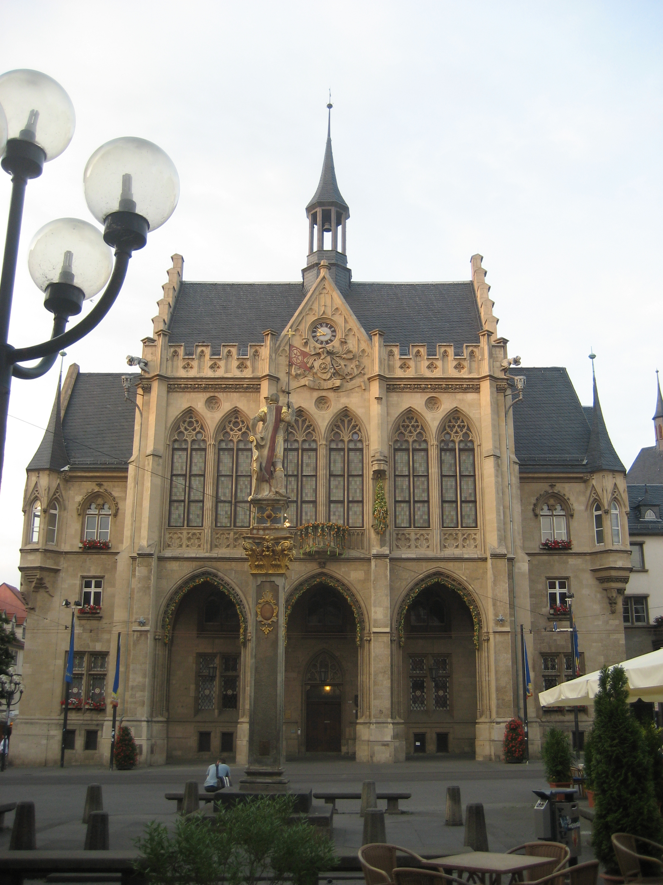 Das Erfurter Rathaus steht am Fischmarkt in Erfurt.